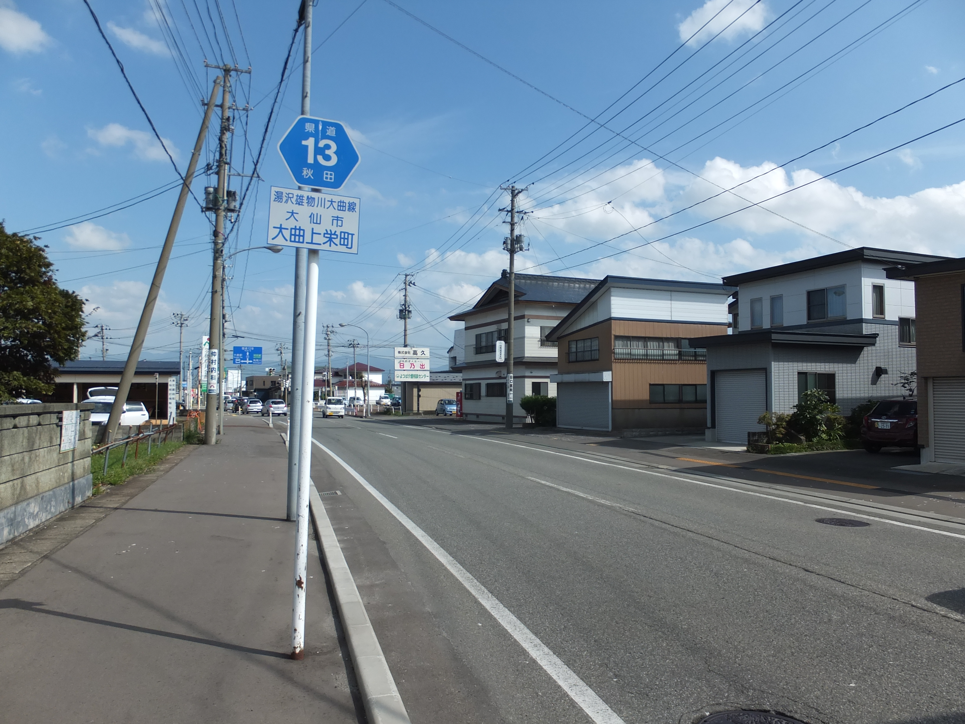 秋田県道13号湯沢雄物川大曲線大曲上栄町付近にて